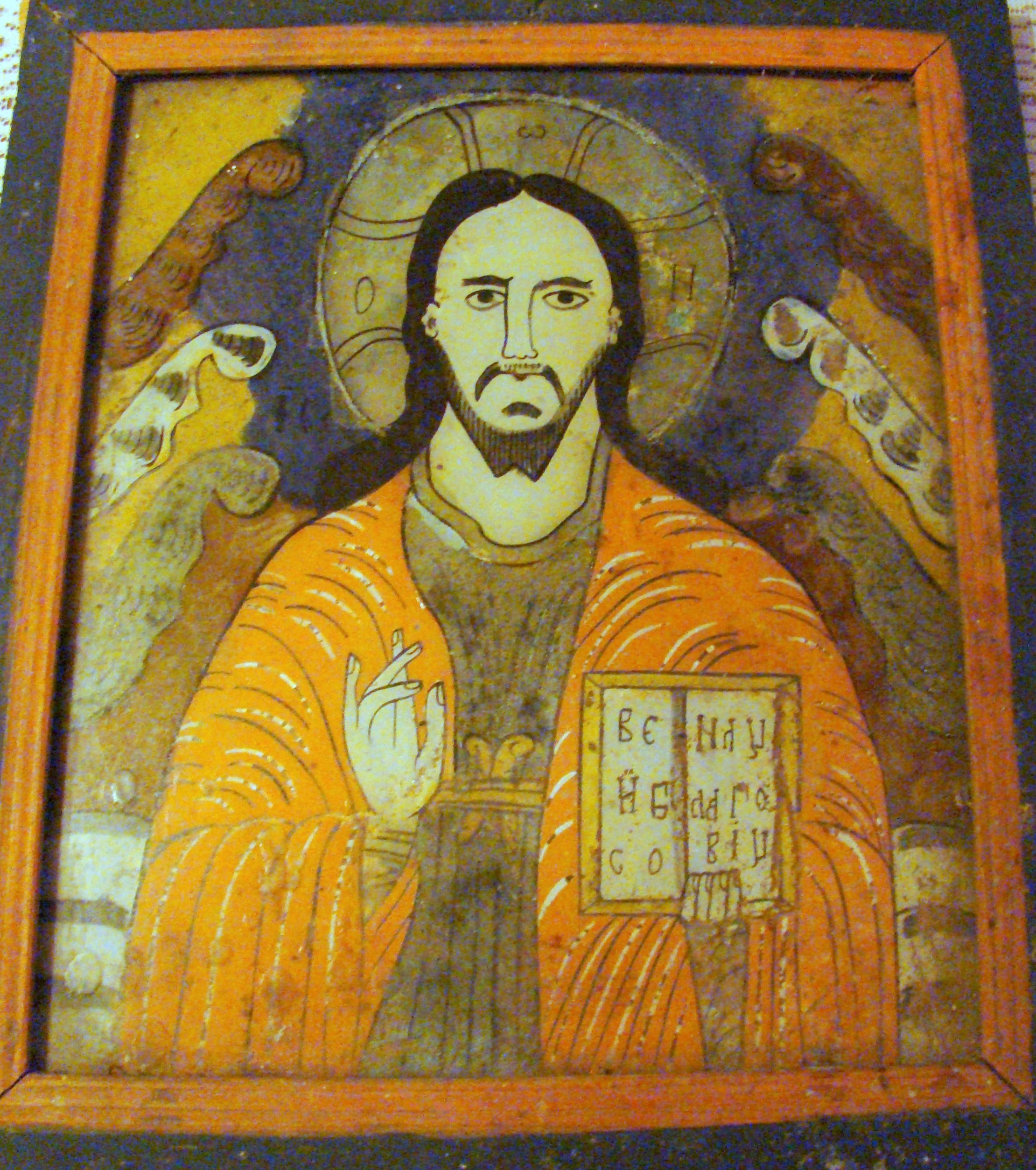 Biserica de lemn „Adormirea Maicii Domnului” din Goila, județul Bihor